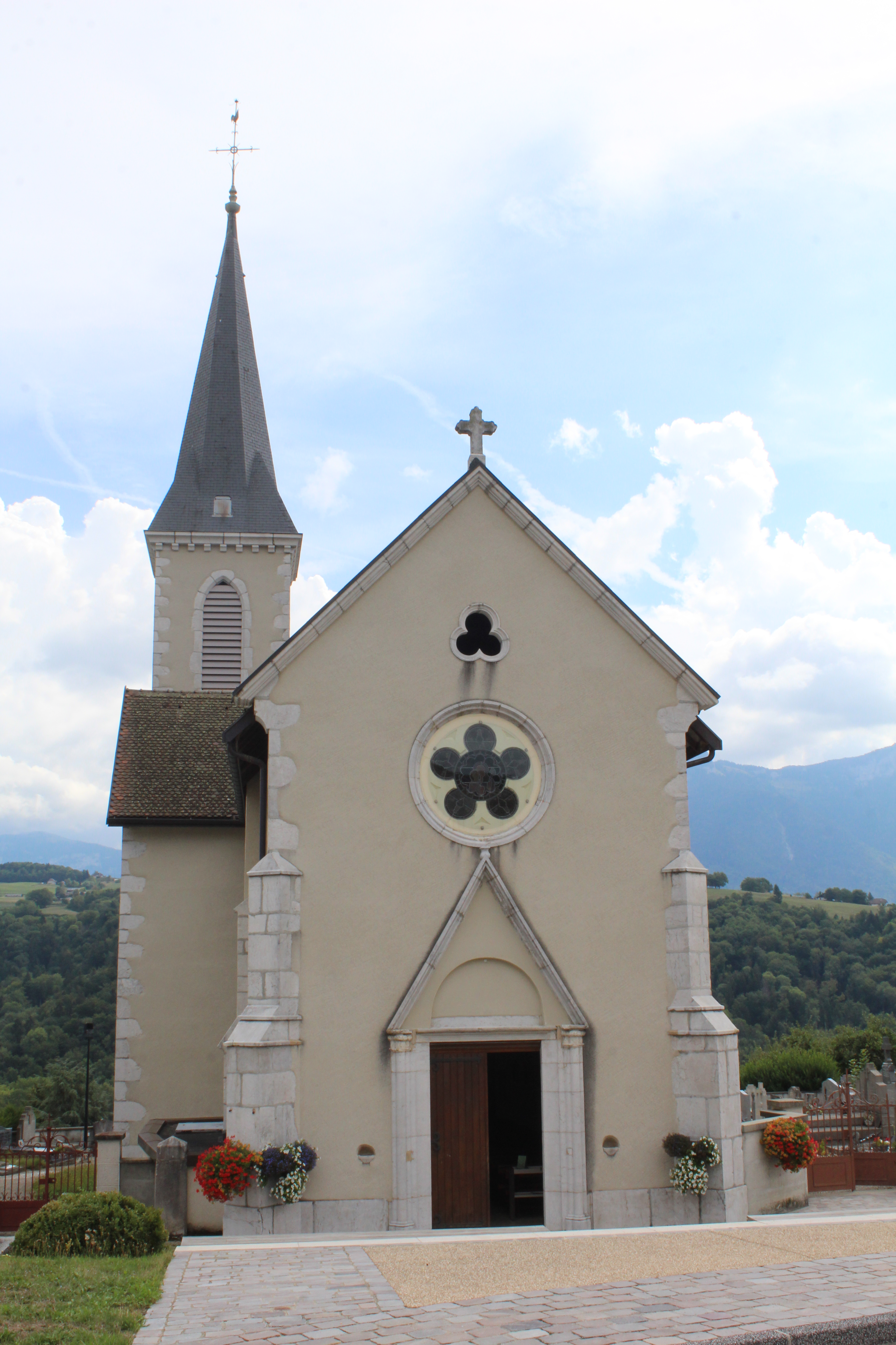 Église Saint-Jean-Baptiste de Charvonnex.